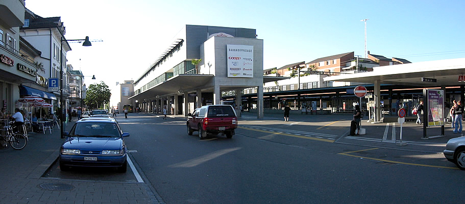 Uster Bahnhof